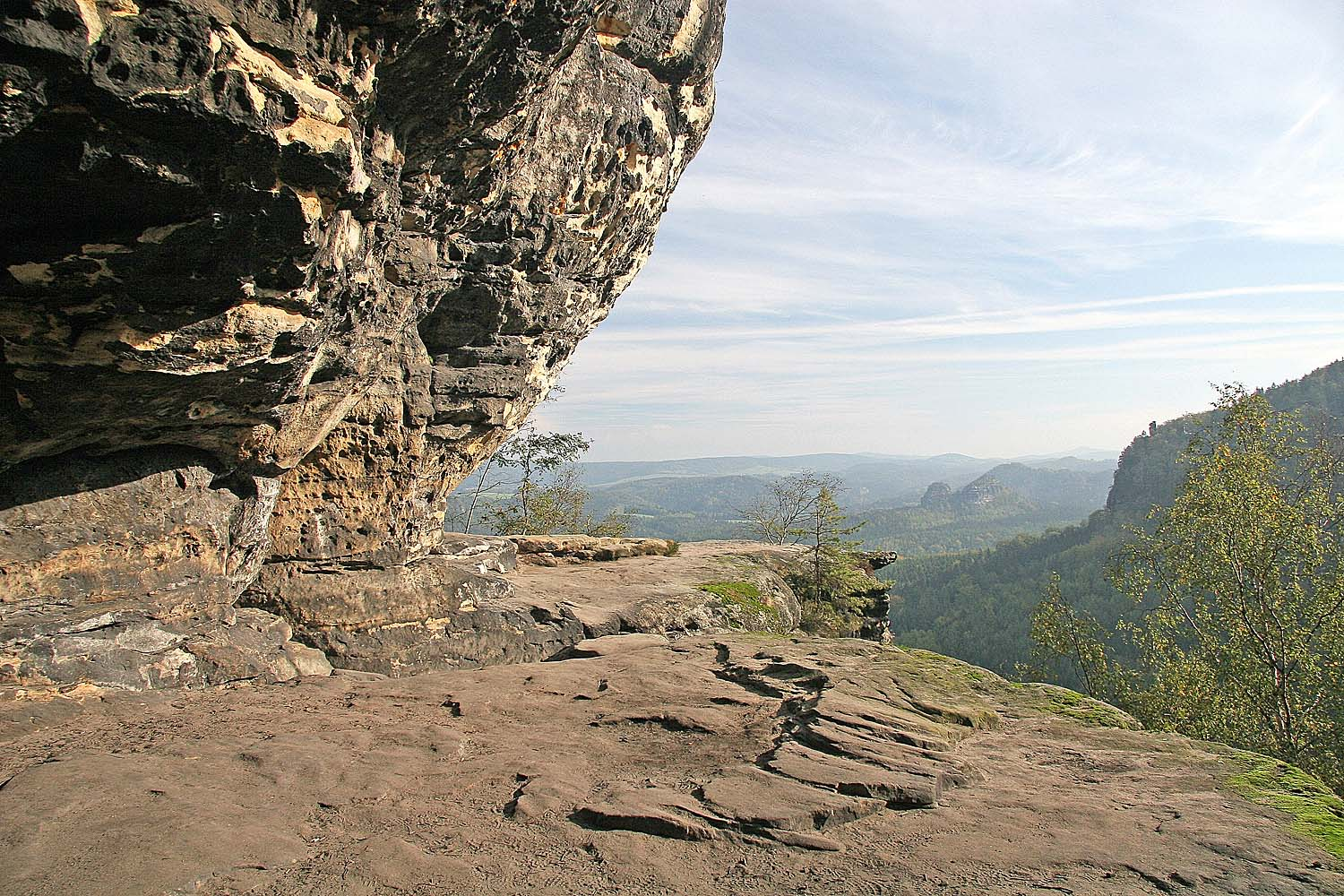 Blick von Idagrotte zum Kleiner Winterberg Autor: Prazak date: 11. 10. 2006